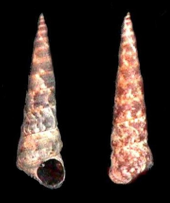 Turritella variegata} estado Vargas - Venezuela.